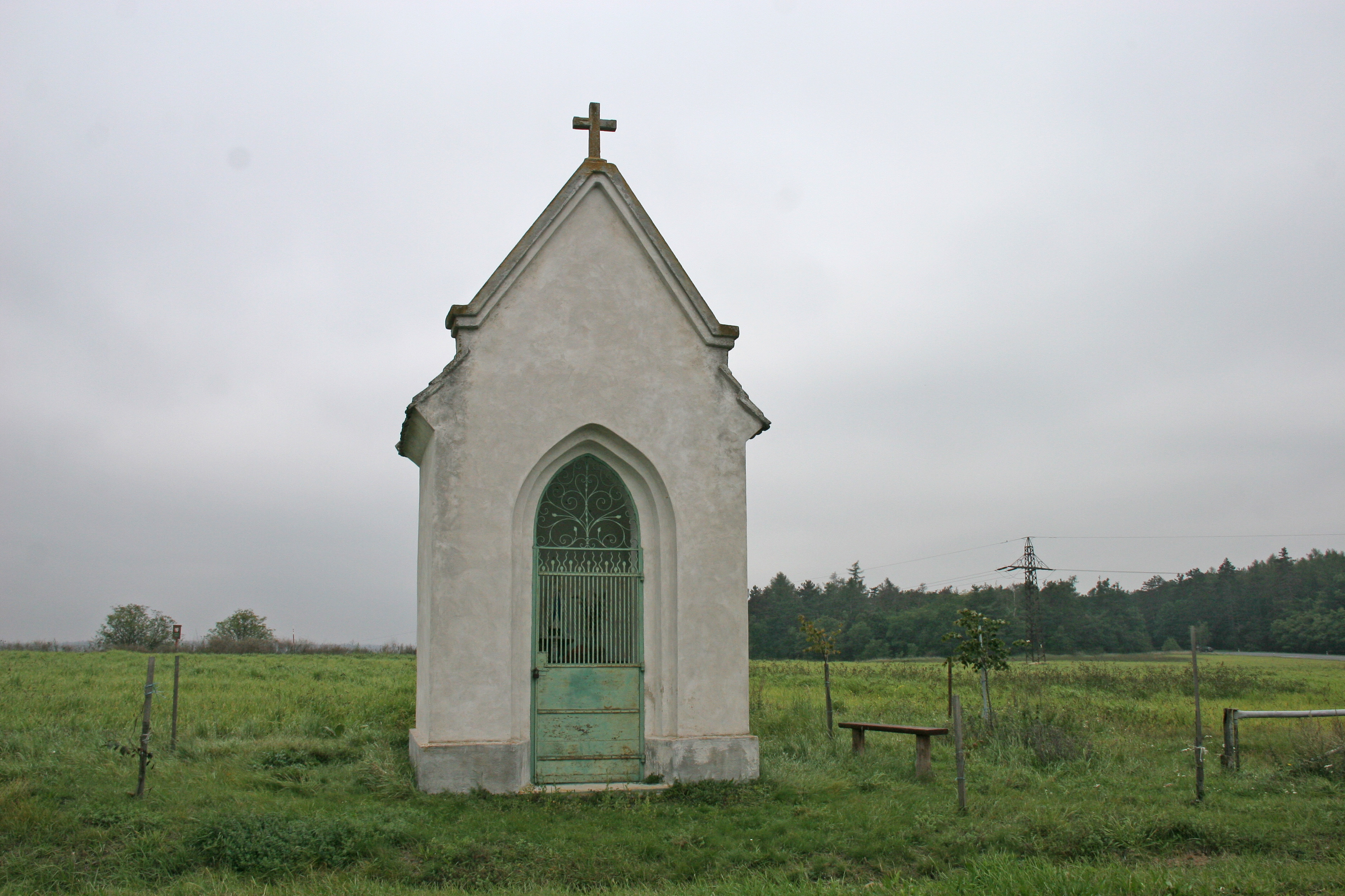 Kaplička, při silnici do Kravska, Žerůtky (okres Znojmo).